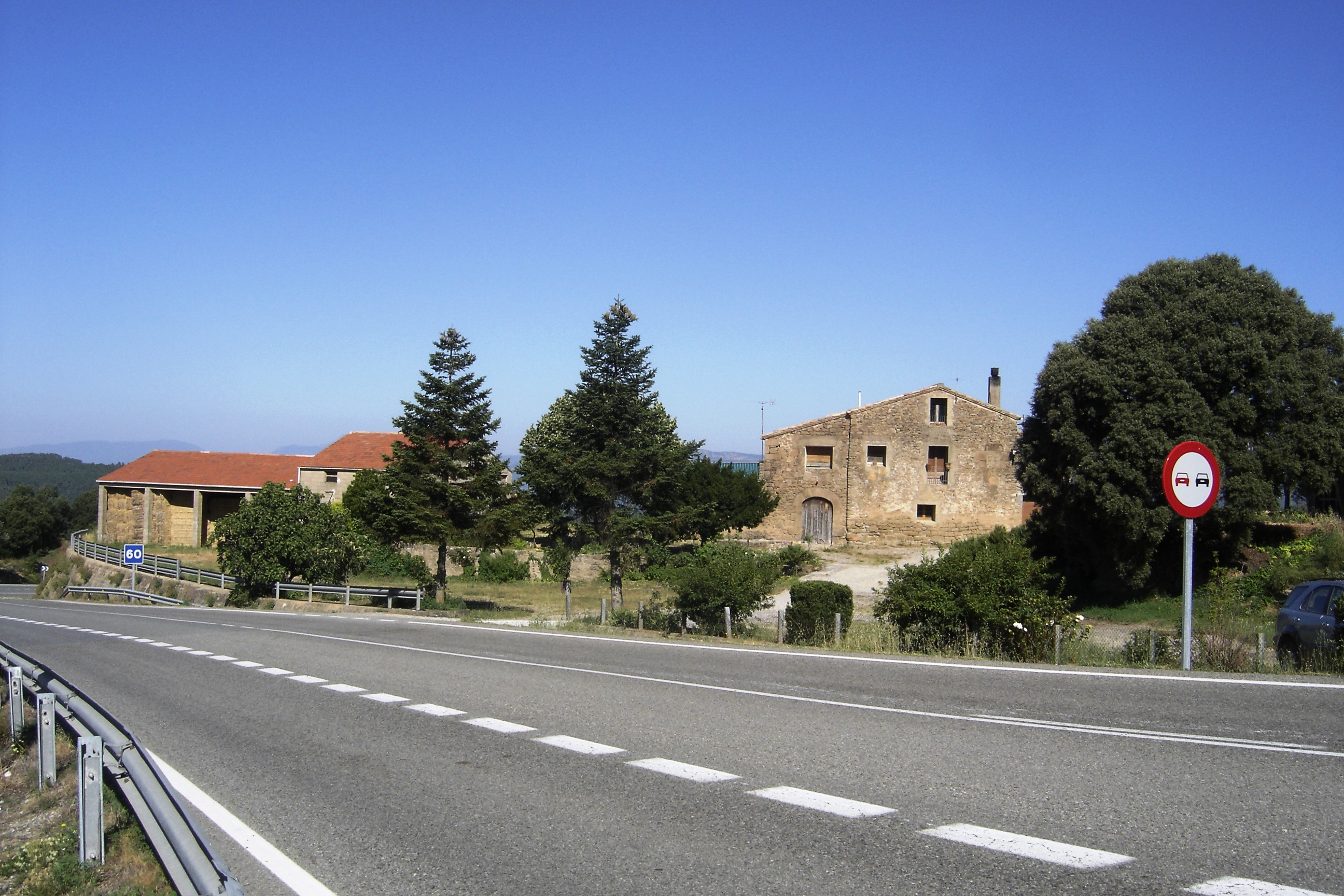 La masia de Vilatobà (Castellar de la Ribera) (Solsonès)